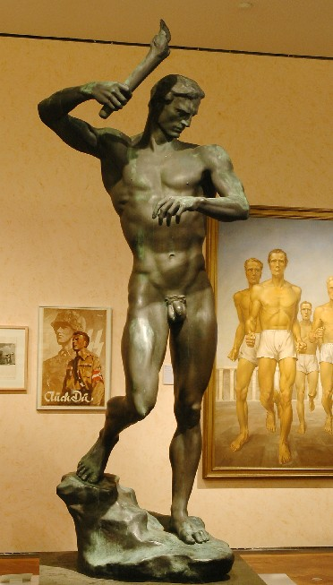 Copyright: Museum Arno Breker/MARCO-VG, Bonn. Hernieuwde toestemming tot publicatie aan Jos43 gegeven op 20.03.07.